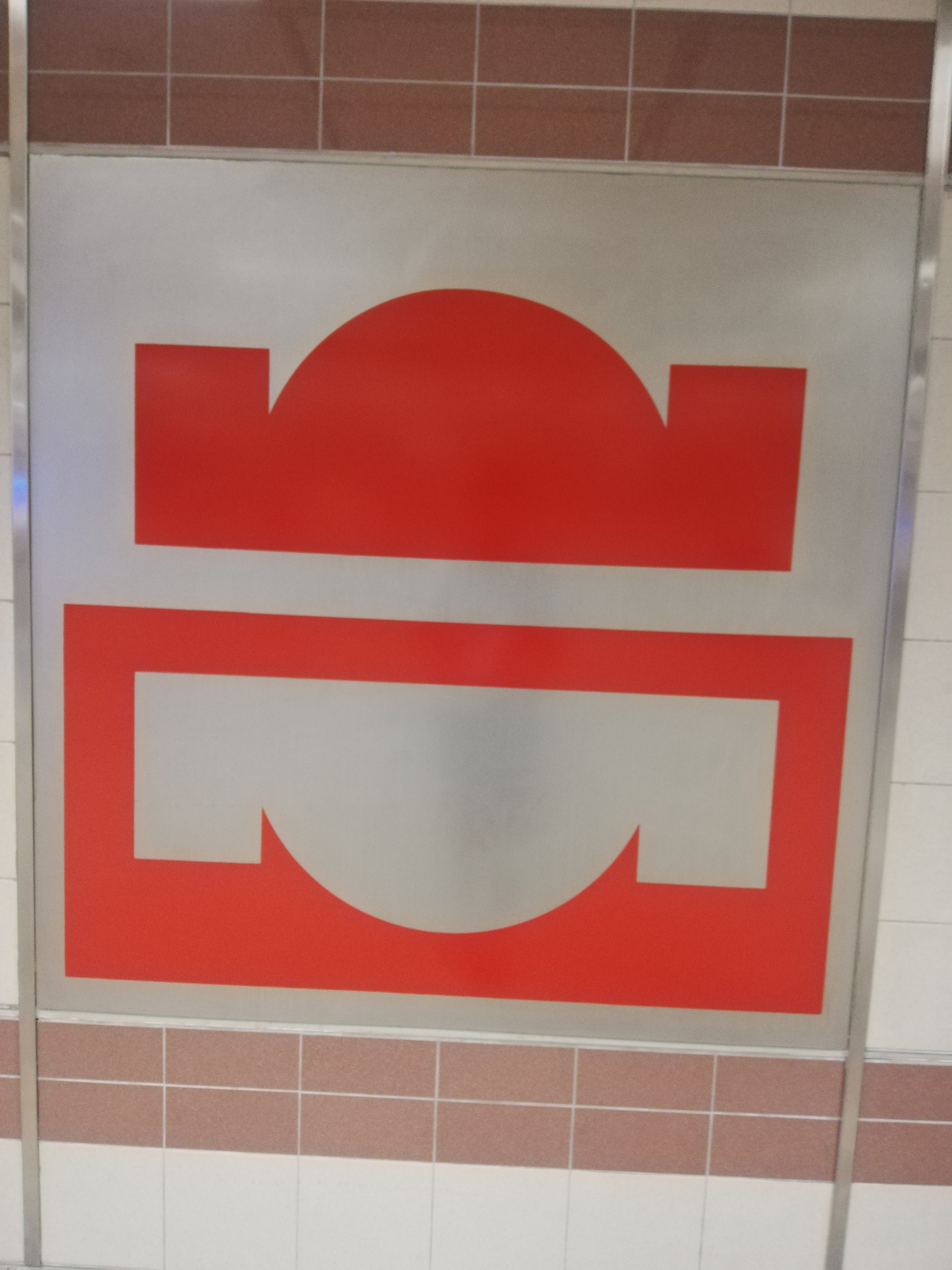 รูปทรงครึ่งวงกลมของอาคารสถานีรถไฟกรุงเทพ สัญลักษณ์ของสถานีหัวลำโพง